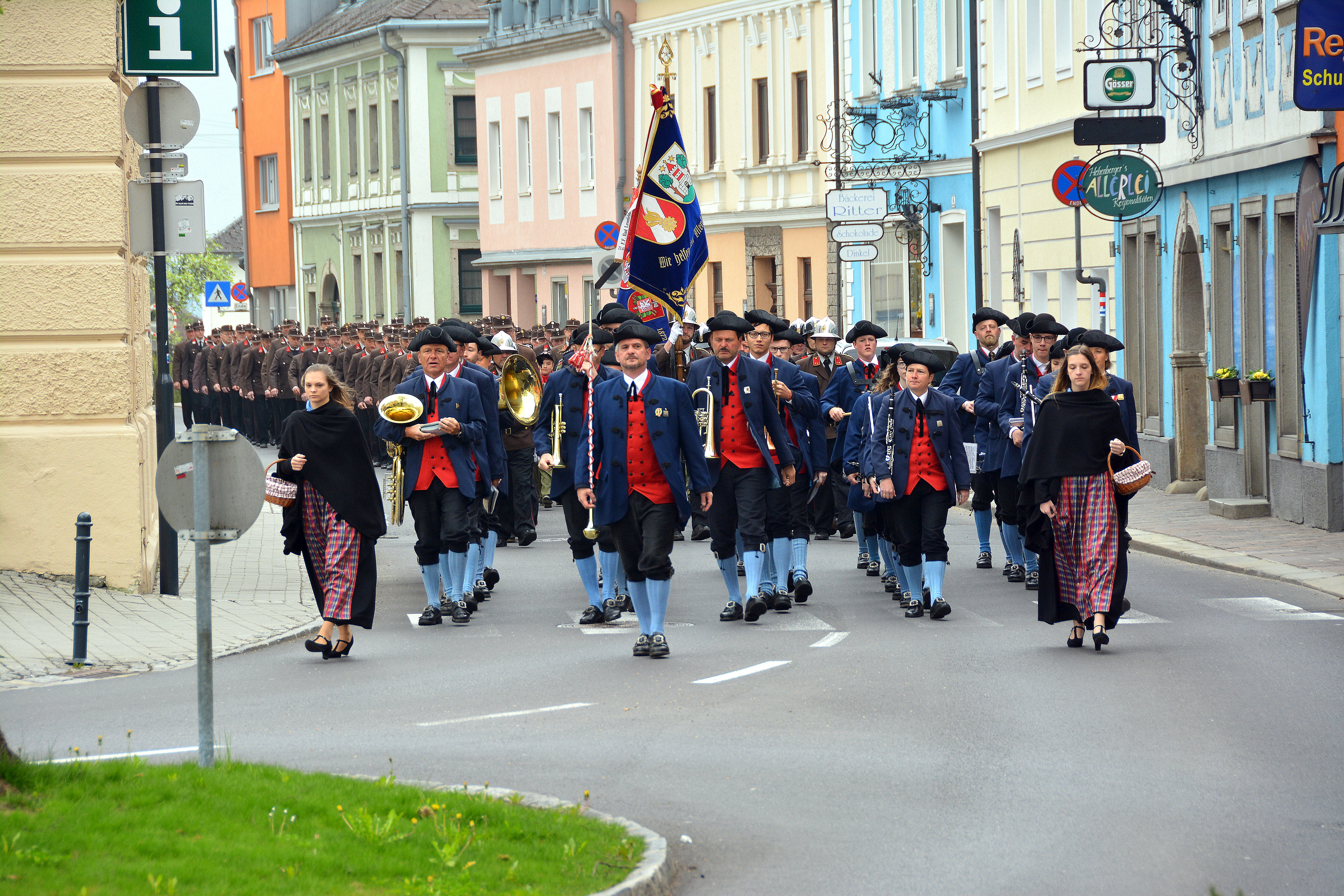 Der Musikverein Bad Leonfelden an der Spitze des Zuges